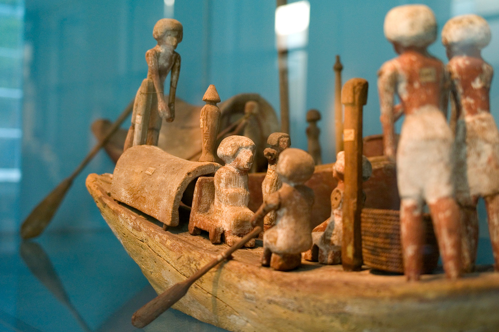 Roeiboot - Middenrijk